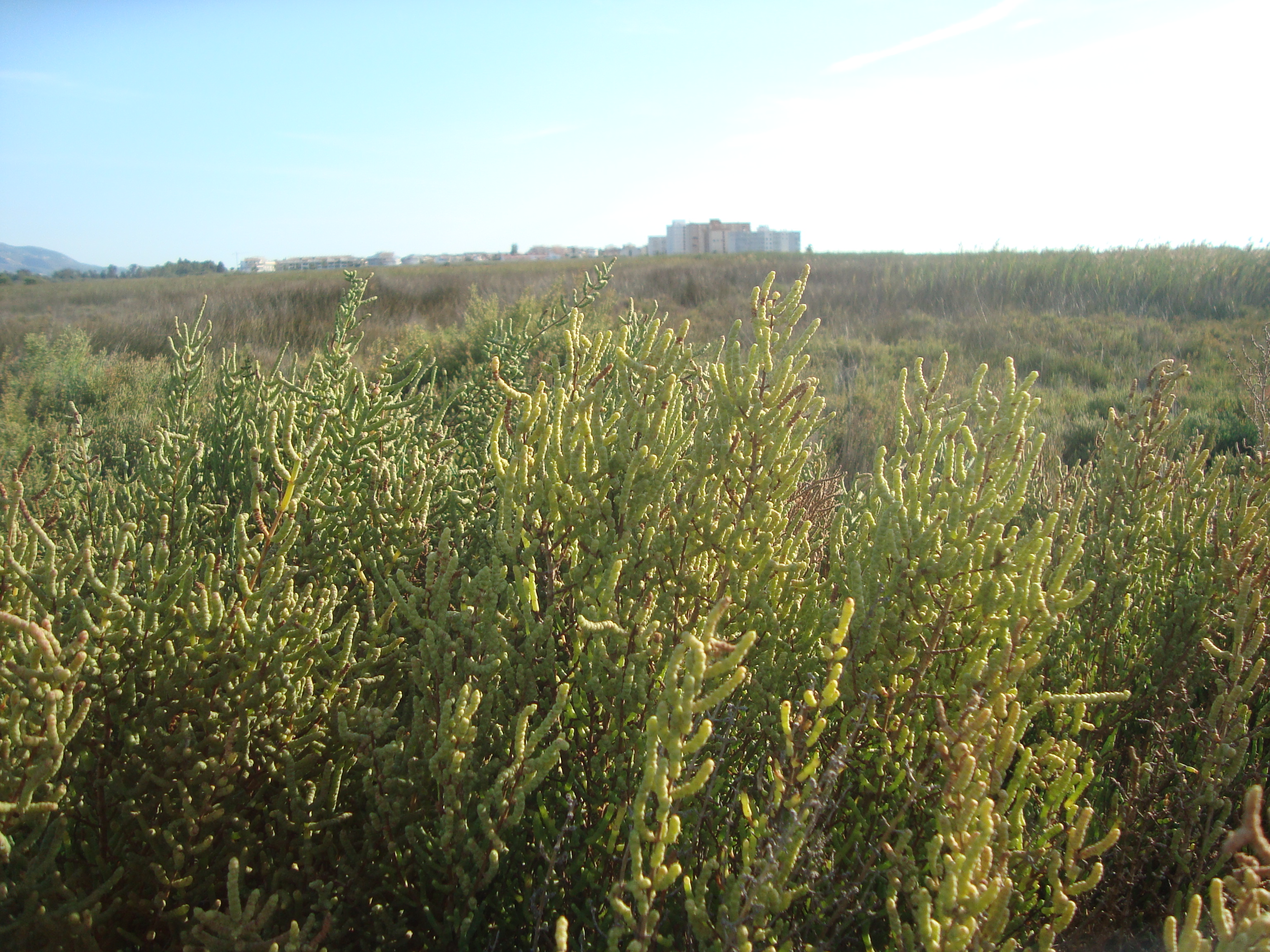 Salicornias, plantas típicas del humedal del Paraje Natural del Prat de Cabanes-Torreblanca